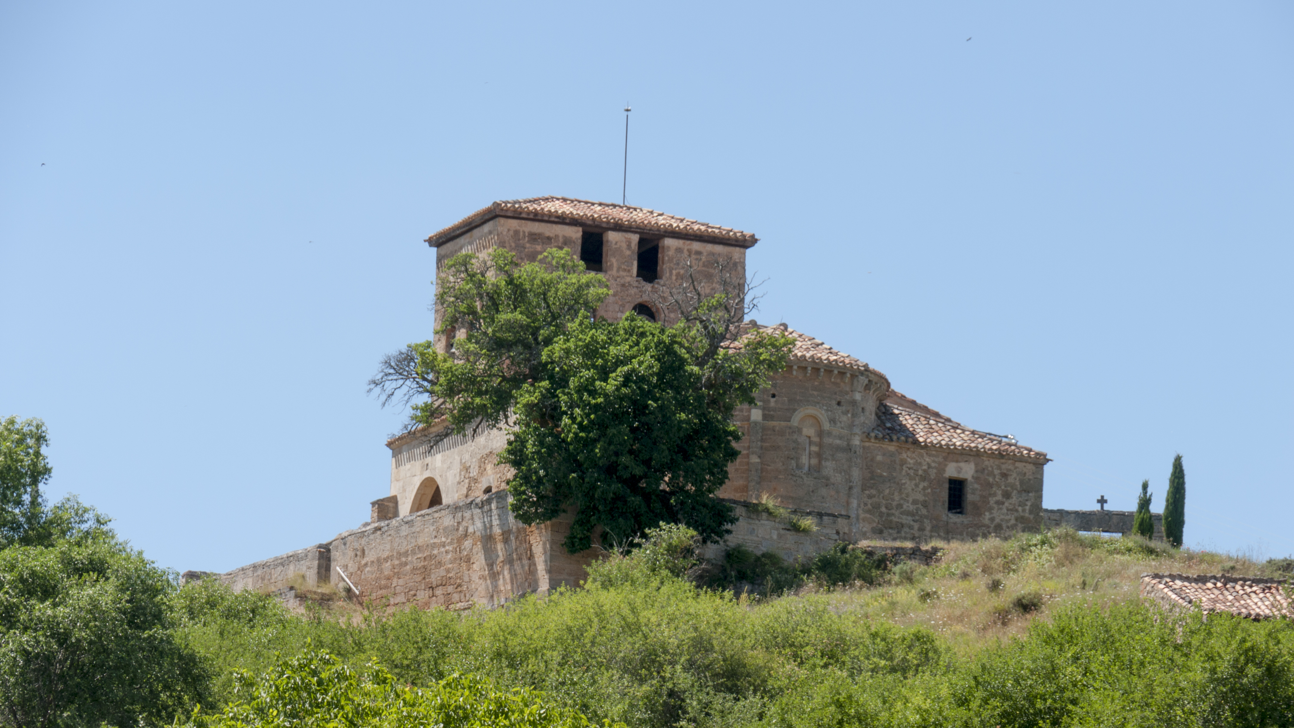 RI-51-0007227